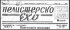 Вестник „Пелистерско ехо“.